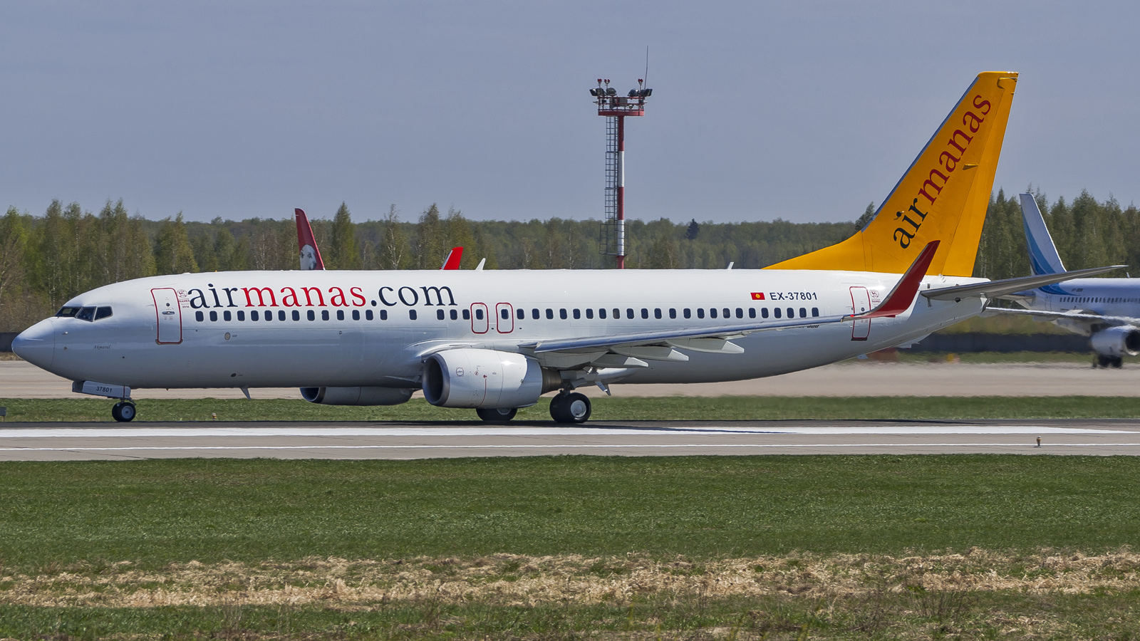 EX-37801 Boeing 737-800 Air Manas DME | UUDD